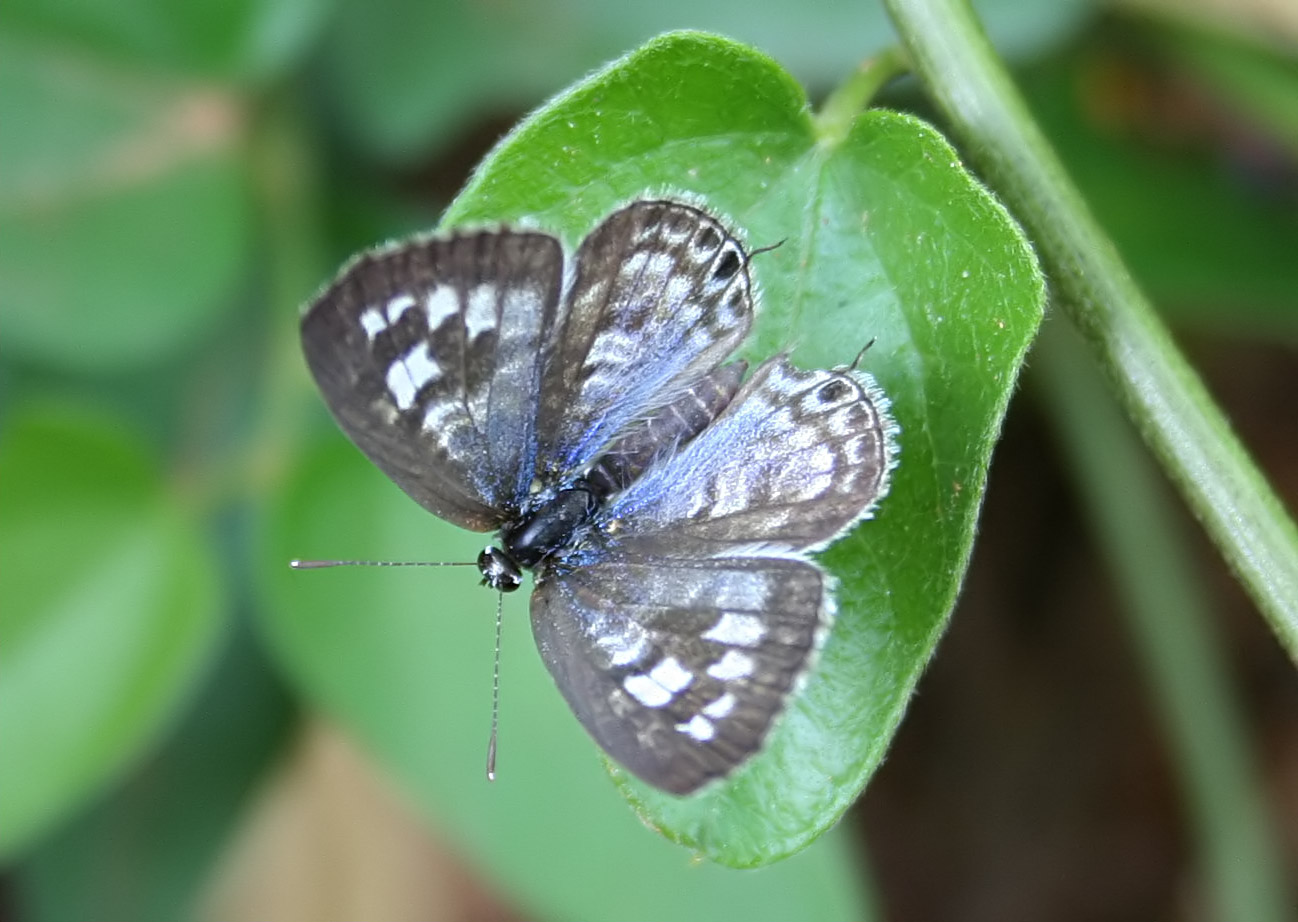 Tarucus plinius (Fabricius, 1793)